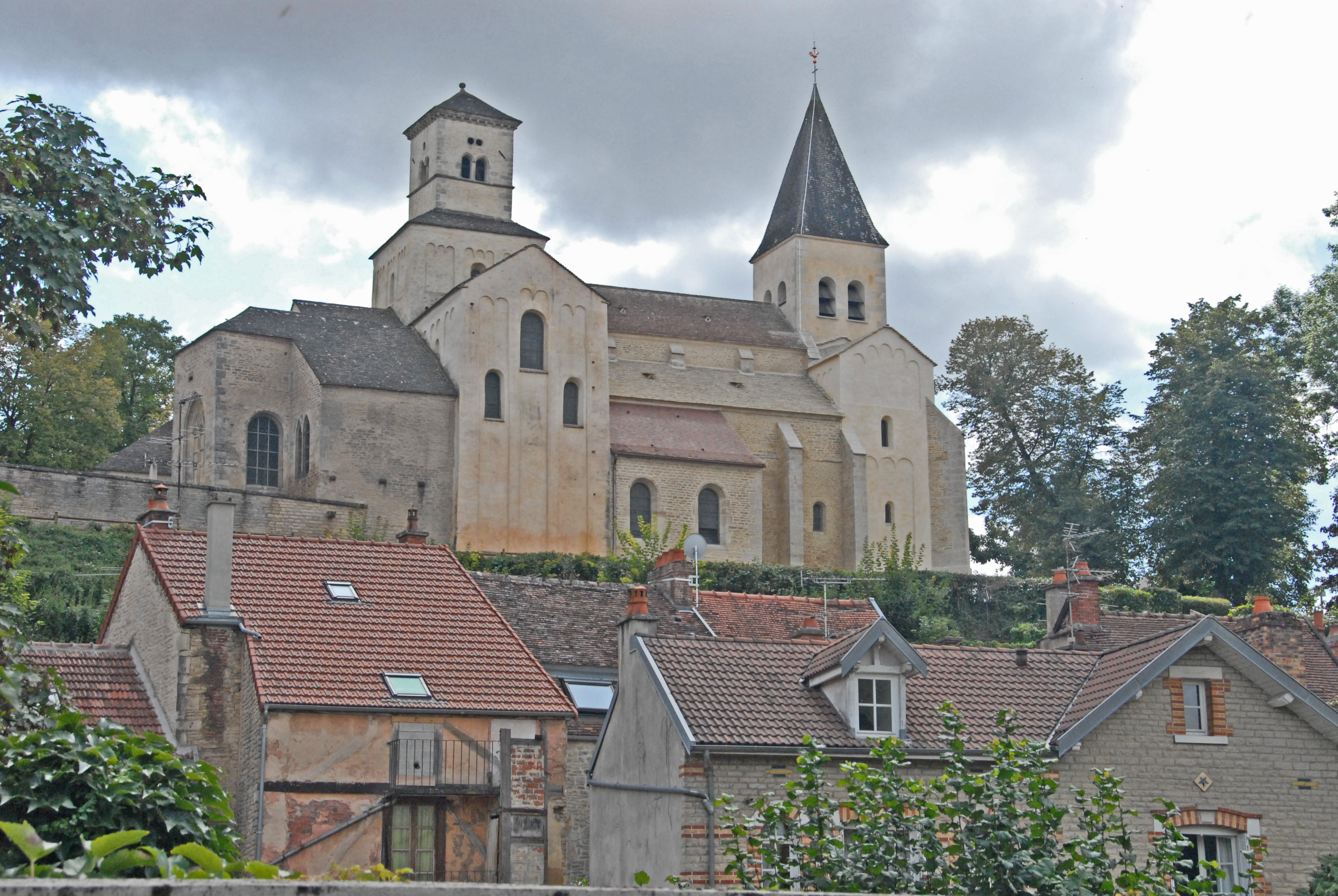 St-Vorles de Châtillon-s-S, Ansicht von N